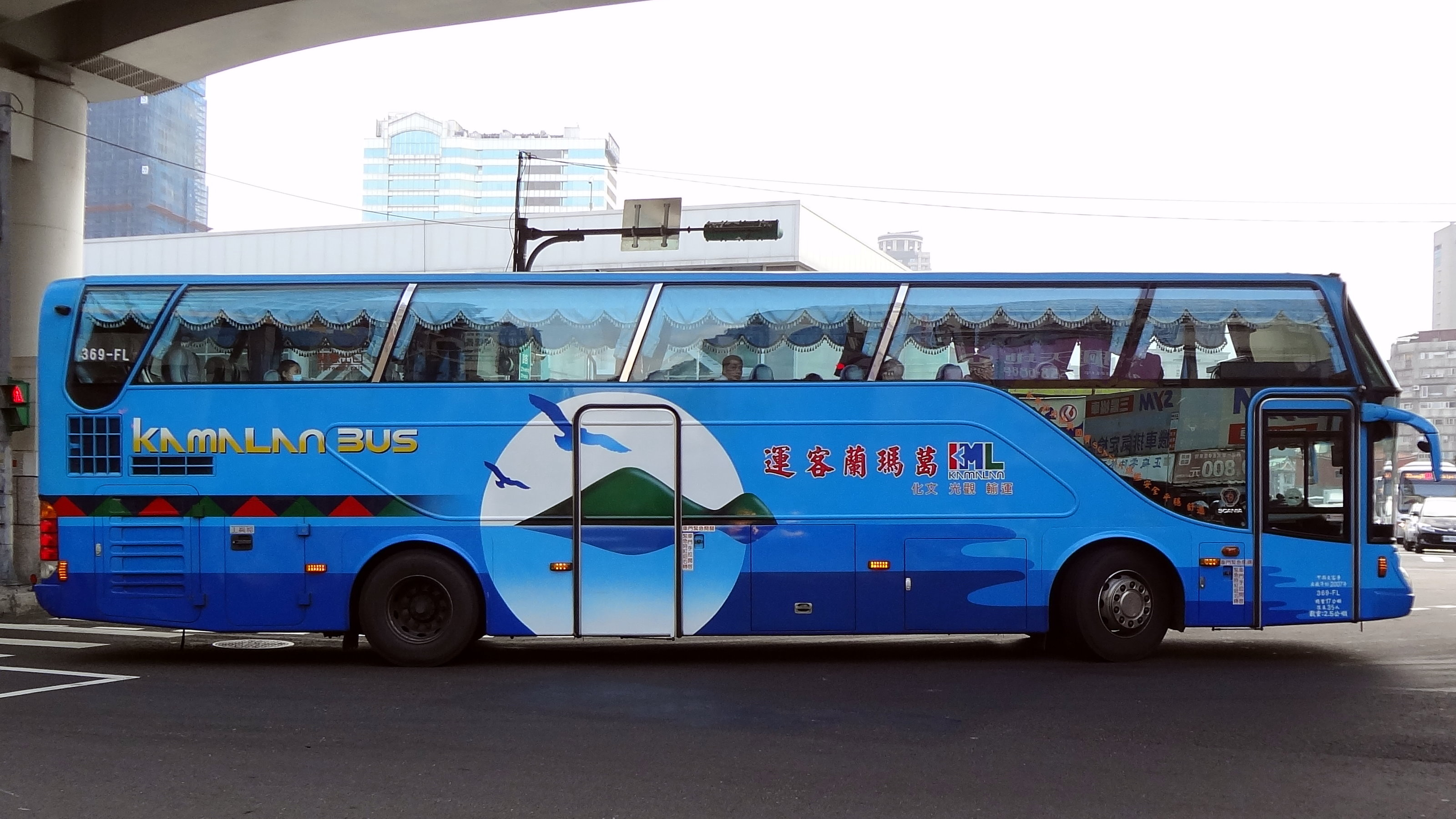 葛瑪蘭客運2007年Scania K380EB大客車369-FL右側。